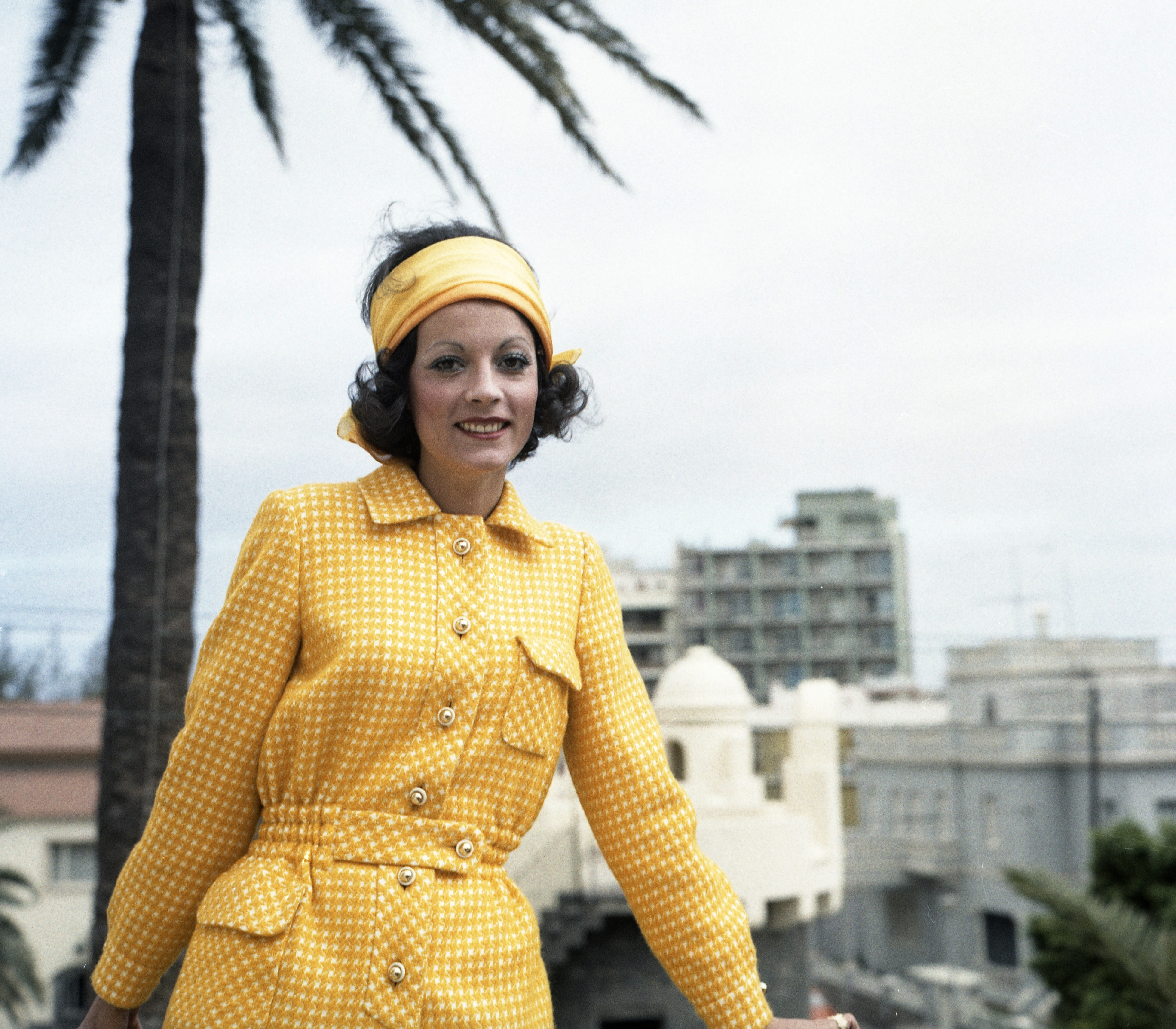 kilátás a Néstor múzeumból a Calle Léon y Castillo felé. Csató Mari manöken. Location: Spain, Canary Islands Tags: colorful, fashion, palm tree Title: kilátás a Néstor múzeumból a Calle Léon y Castillo felé. Csató Mari manöken.